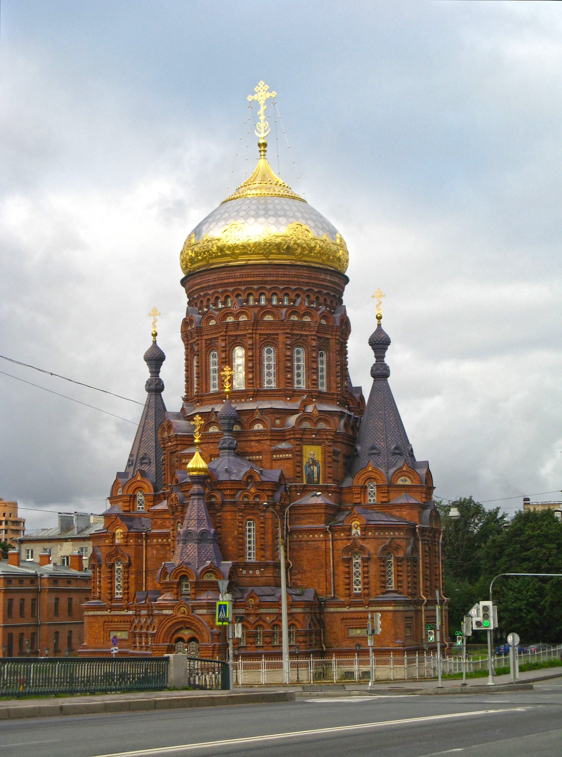 Церковь Богоявления Господня (Гутуевская): Двинская улица, 2, Кировский район, Санкт-Петербург